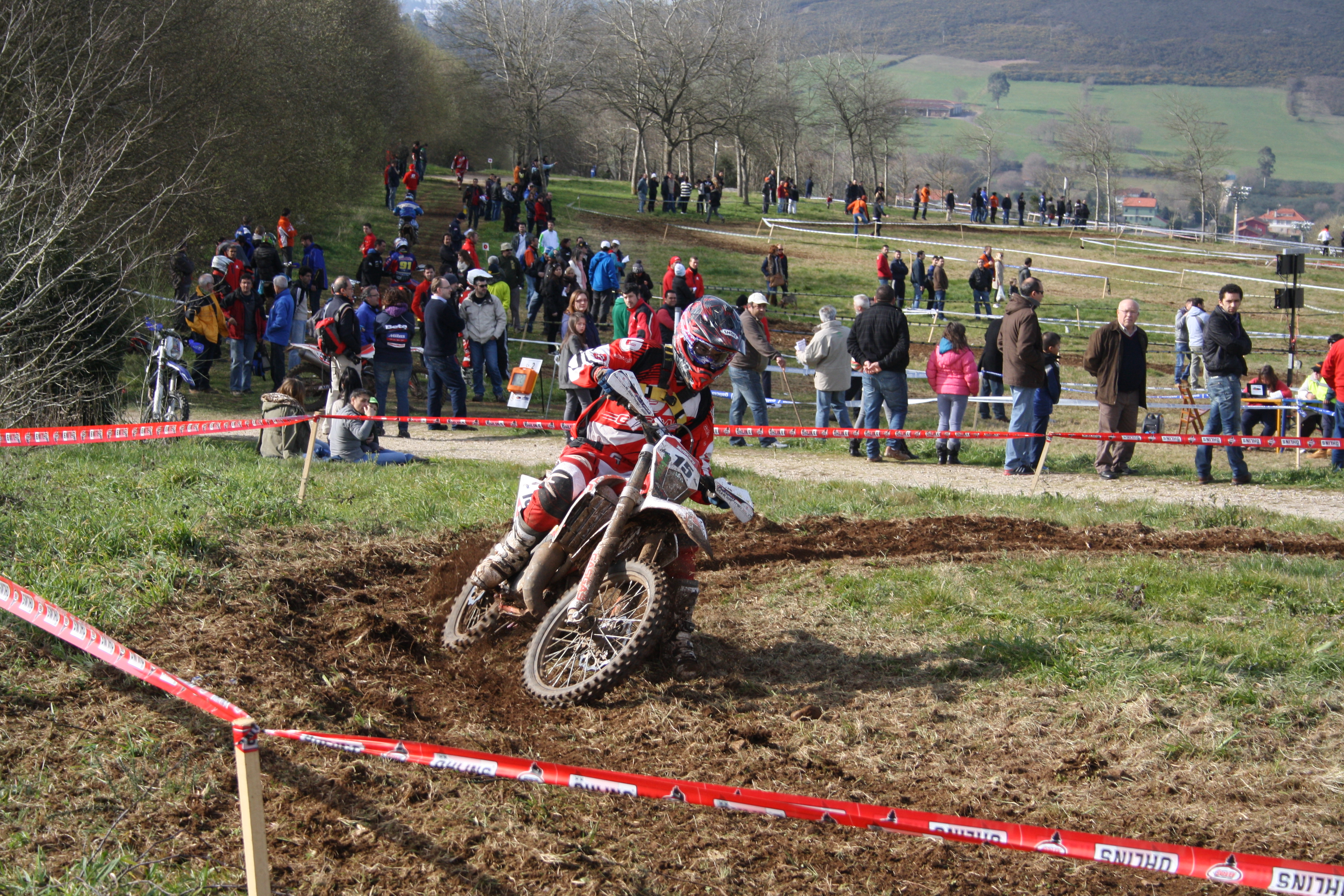 Campeonato de España de Motocros-Santiago de Compostela 3-4 de marzo de 2013.